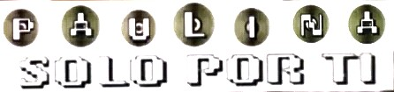 Logo del sencillo Solo Por Ti de Paulina Rubio lanzado en 1996 por Emi Latin.